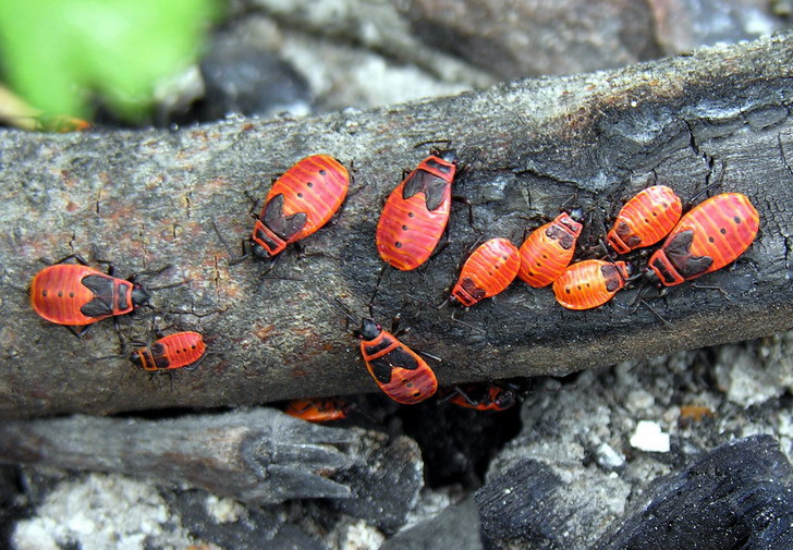 Blakė kareivėlis (Pyrrhocoris apterus), jaunikliai ant degėsių. Šeima: Raudonblakės (Pyrrhocoridae)